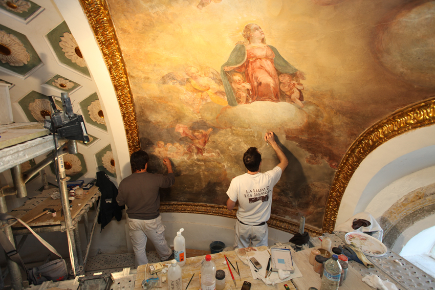 Restauración de las pinturas murales de la capilla de la Virgen de los Desamparados en 2011 a cargo de La Luz de las Imágenes con motivo de la exposición 'Camins d'Art' en Alcoy